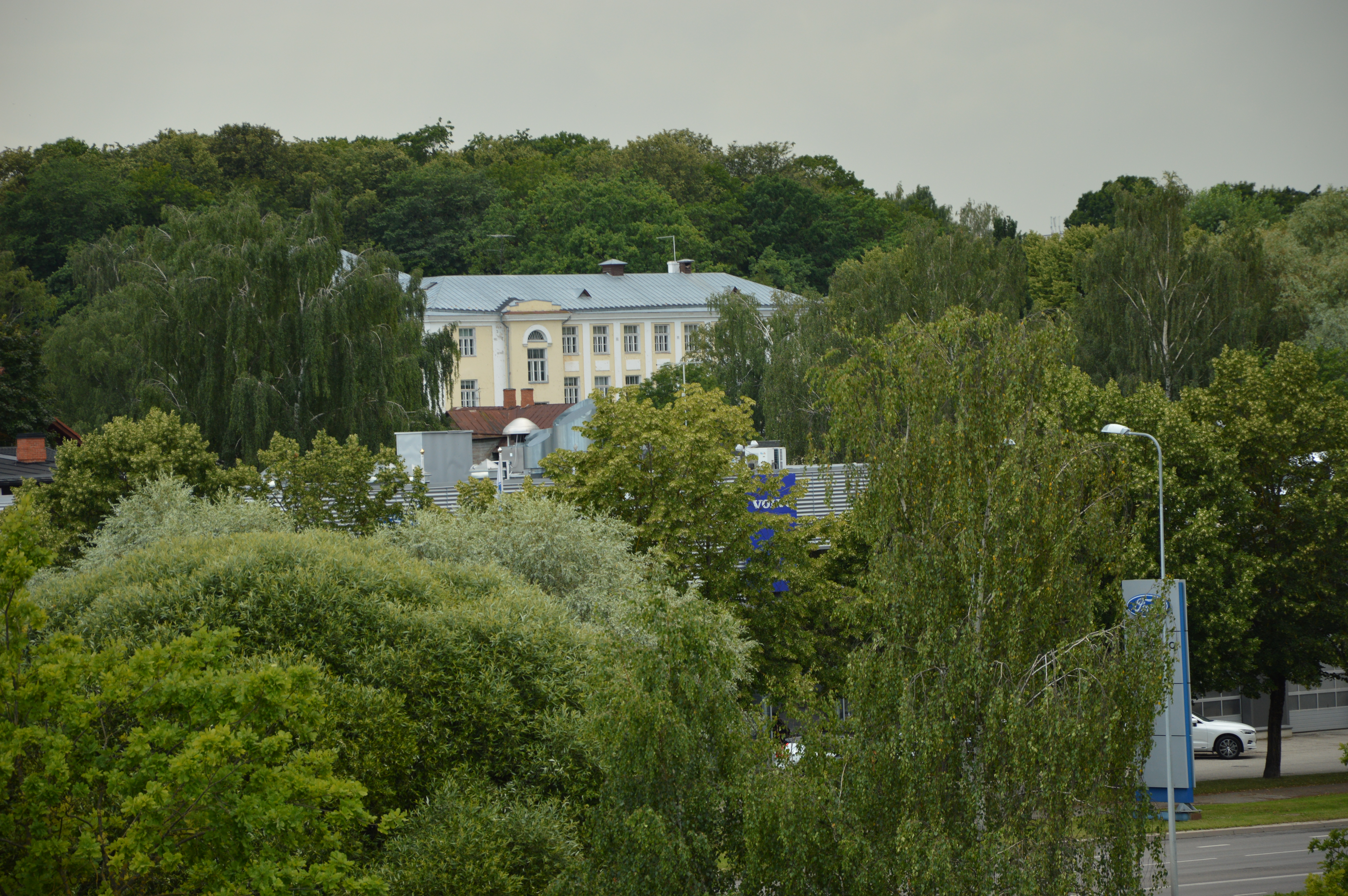 Tartu Karlova Kool pildistatuna Sõpruse sillalt.